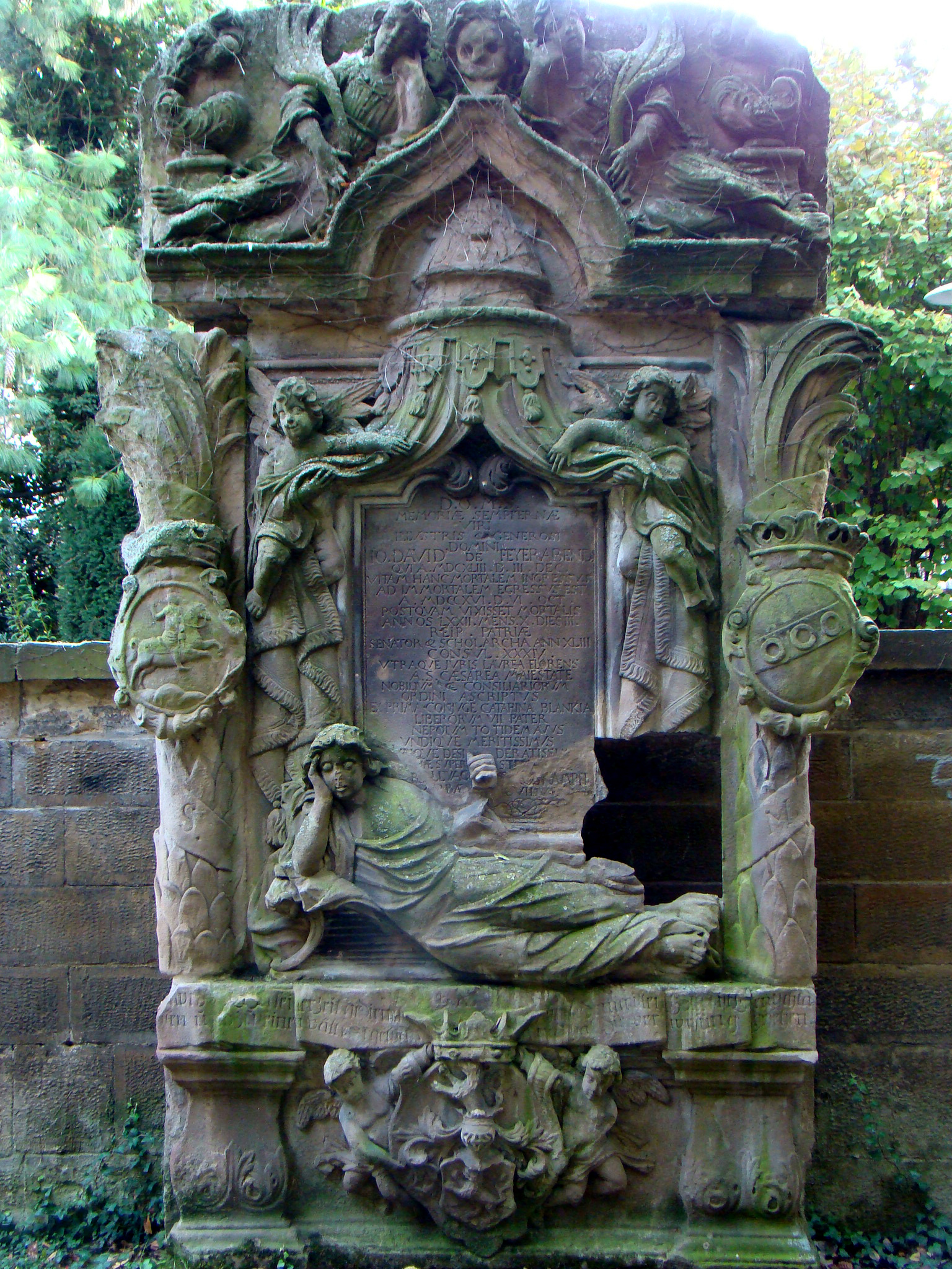 Grabstein des Bürgermeisters Johann David Feyerabend auf dem Alten Friedhof Heilbronn.